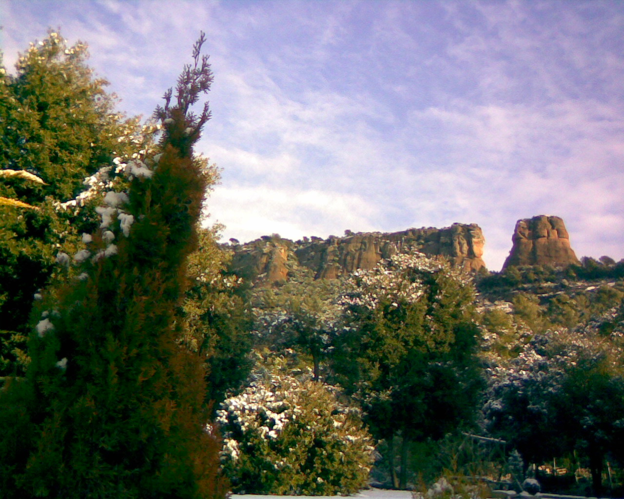 Sant Llorenç del Munt nevat. Vist des de Matadepera, a la dreta destaca el Cavall Bernat, ver l'esquerra i fora de la imatge hi ha el cim de la Mola, el més elevat del Vallès Occidental.